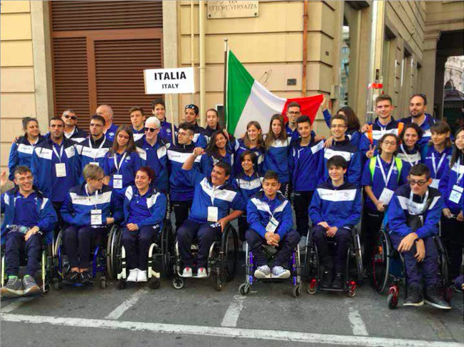 La squadra italiana dei giochi epyg prima dell'inizio delle gare